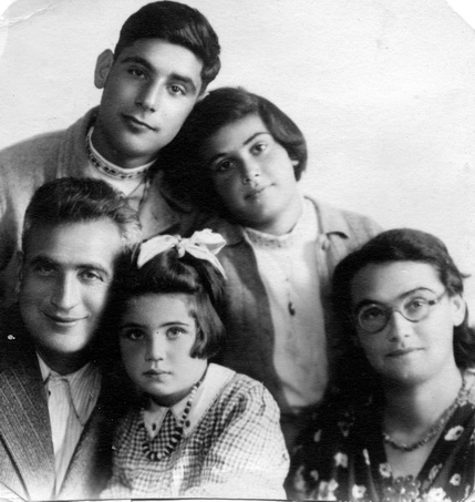 18.משפחת שטראוס 1945 מיכאל ונעמי עומדים טרודה רותי וארנסט יושבים - מושב עטרות